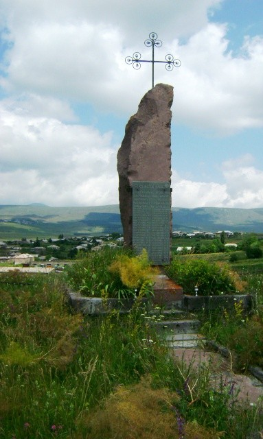 Հուշարձան Ալաթումանում